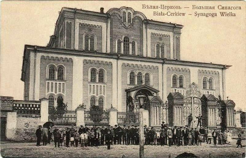 Большая хоральная синагога в Белой Церкви.